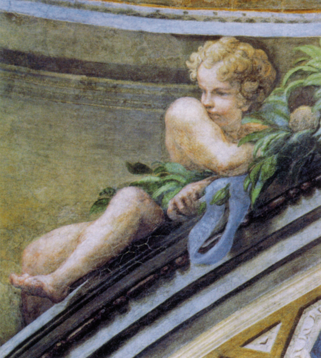 Putto